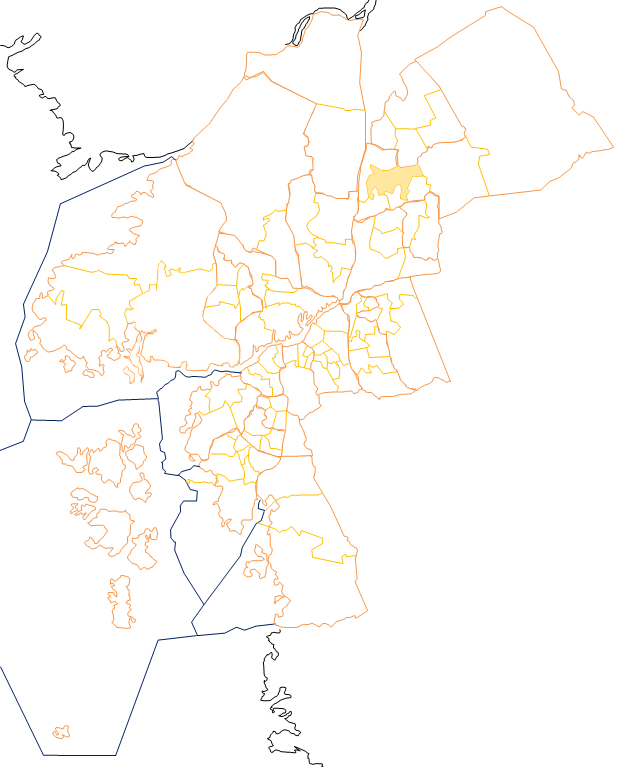 Karta som visar primärområdes belägenhet i Göteborg